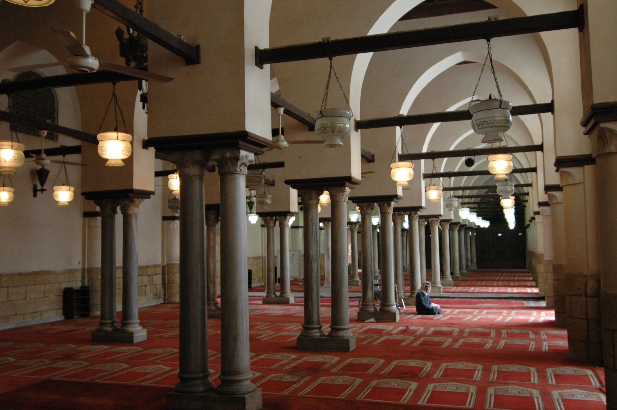 Cairo: moschea di El-Azhar